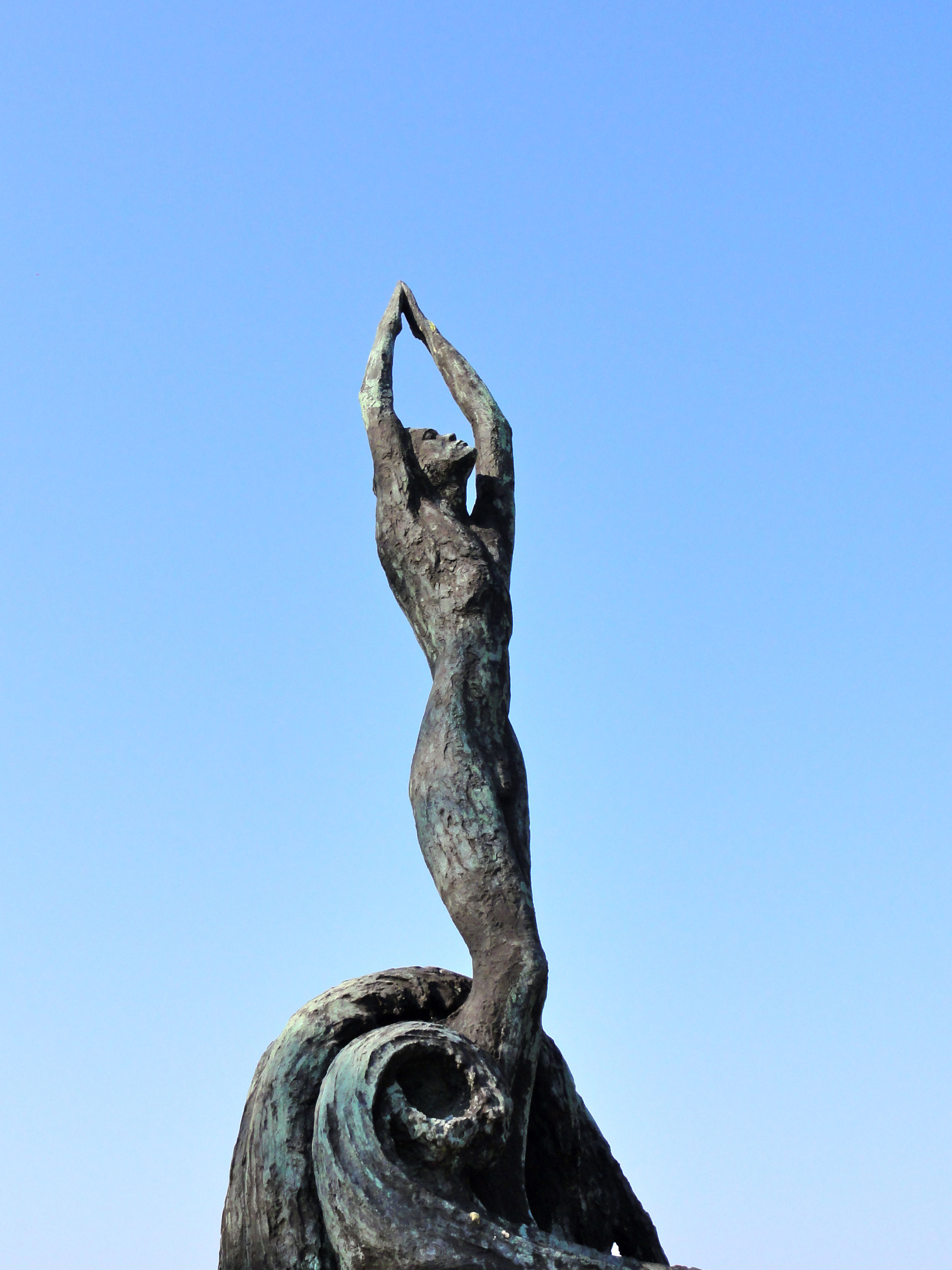 Oorlogsmonument bij de voormalige zeevaartschool Abel Tasman in Delfzijl door Annette Dekking-van_Haeften